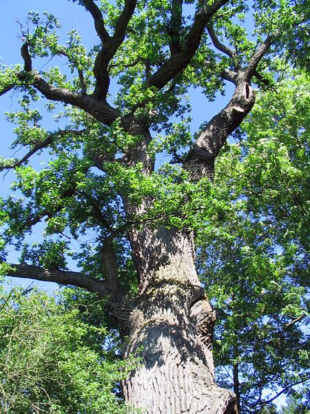 Koruna dubu u Kráčny nad Pozorkou.